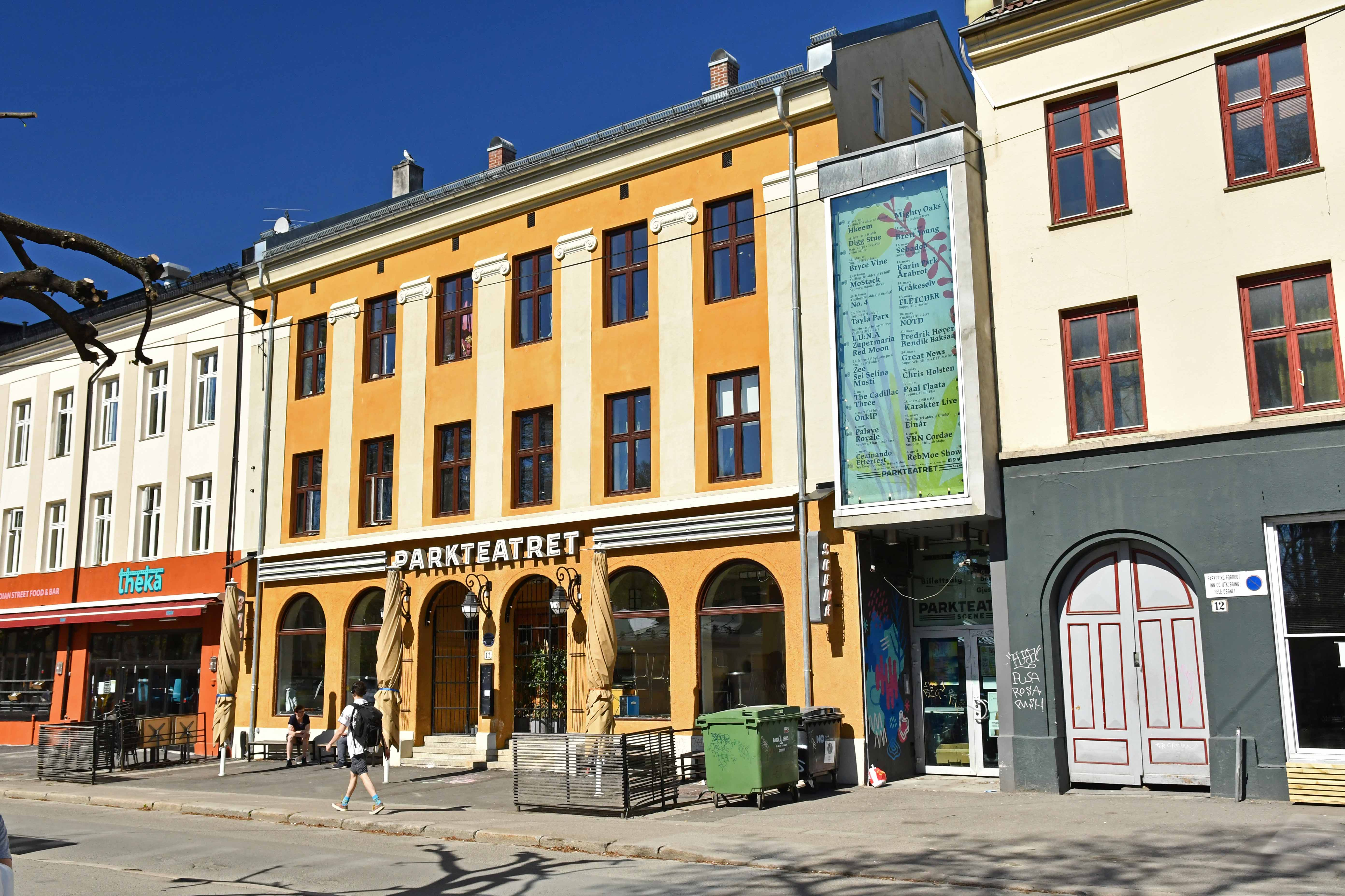 Parkteatret, Olaf Ryes plass 11. Gaten som går langs bygningen er Grüners gate.